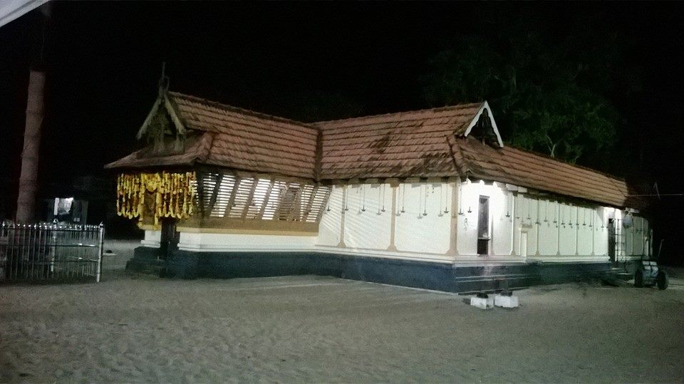 Nalukulangara Temple